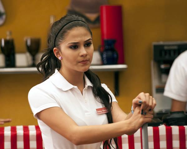 Greeicy Rendon interpretando a Daysi o´brian